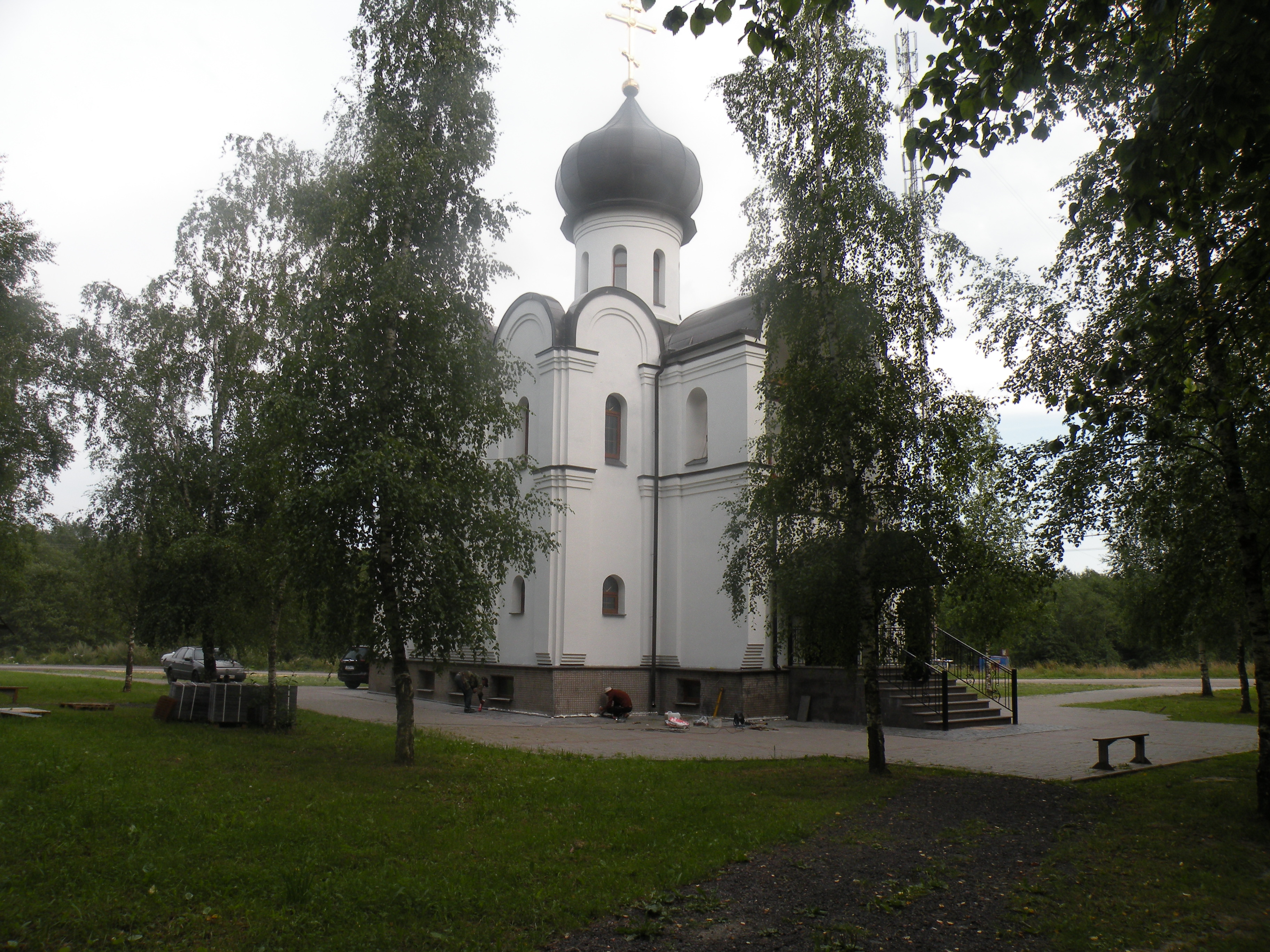 Новая церковь в деревне Жабино